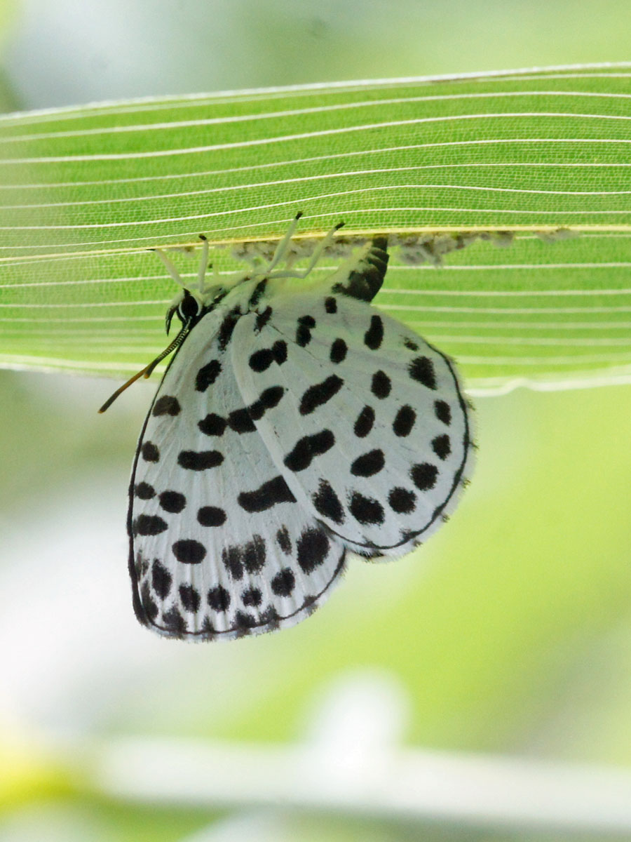 ゴイシシジミ